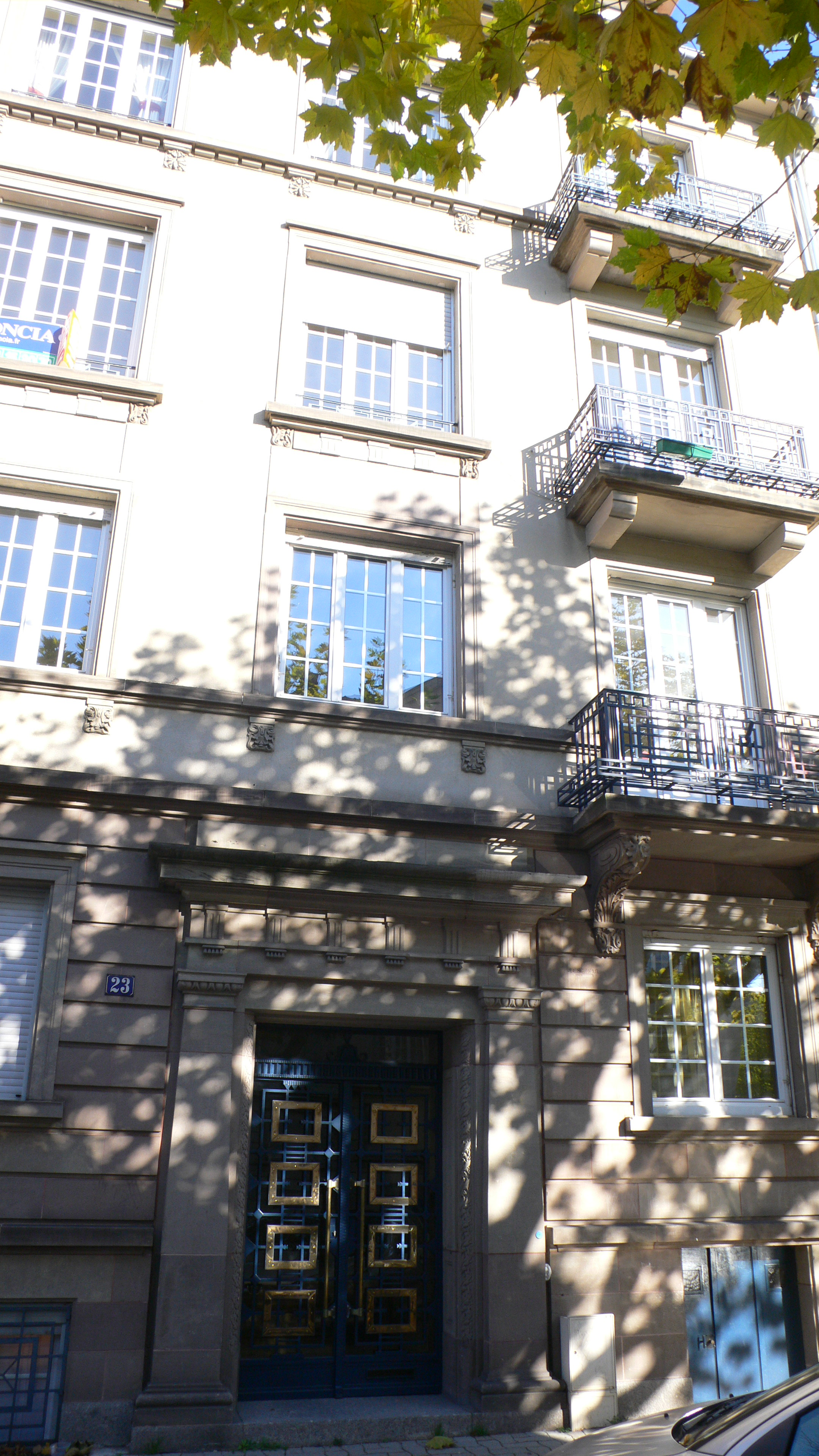 Immeuble où vécut Cavaillès en 1938-1939